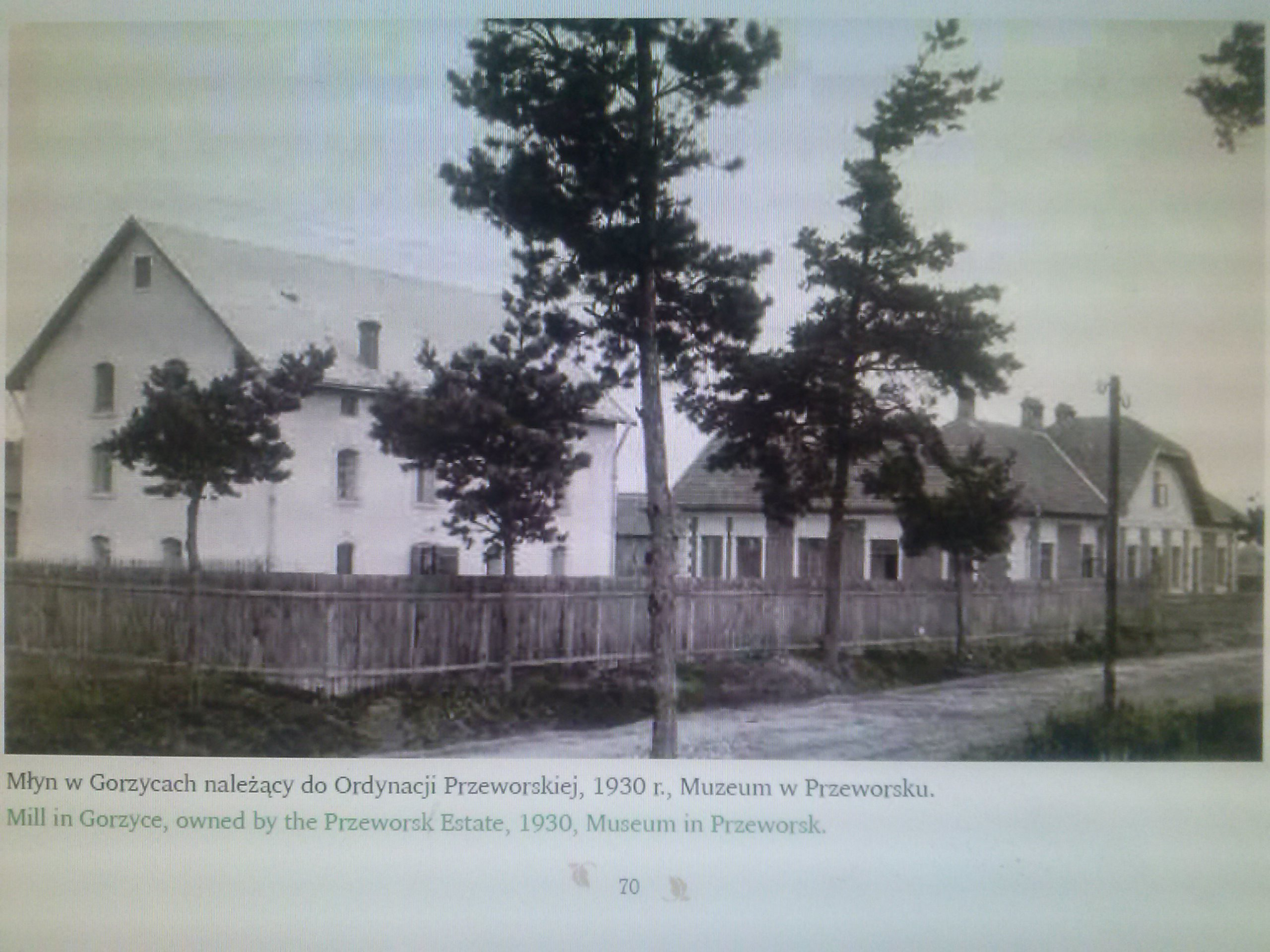 Dawny młyn w Gorzycach należący do Ordynacji Przeworskiej Lubomirskich w 1930 roku. (Po II wojnie światowej w posiadaniu Cegielskich, ok. 1980 roku spalony, a później mury całkowicie rozebrane). Dalej widoczny budynek, w którym obecnie jest Dom Zakonny s.s. KDzJ.